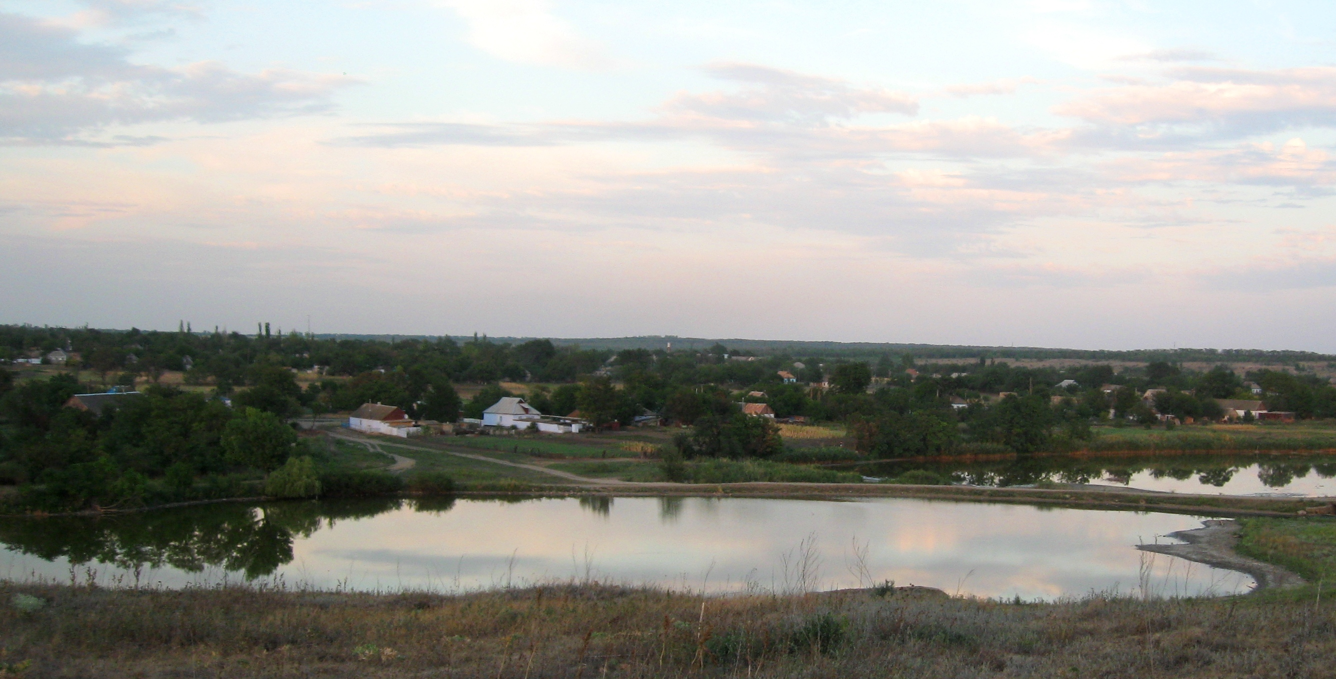 Вечір насувається на Володимирівку